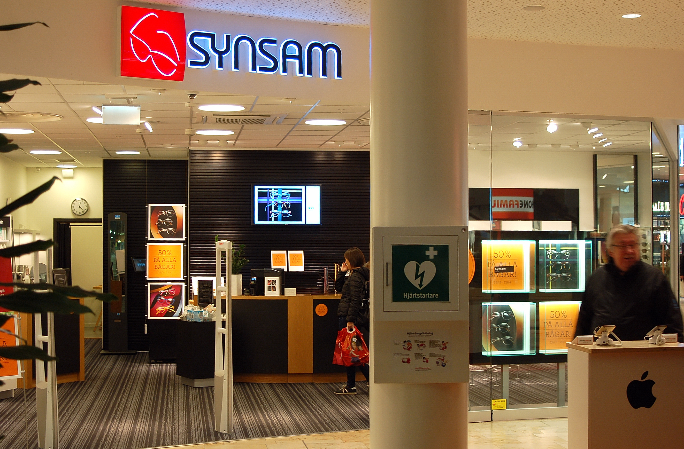 Synsam i Mitt i City, Karlstad